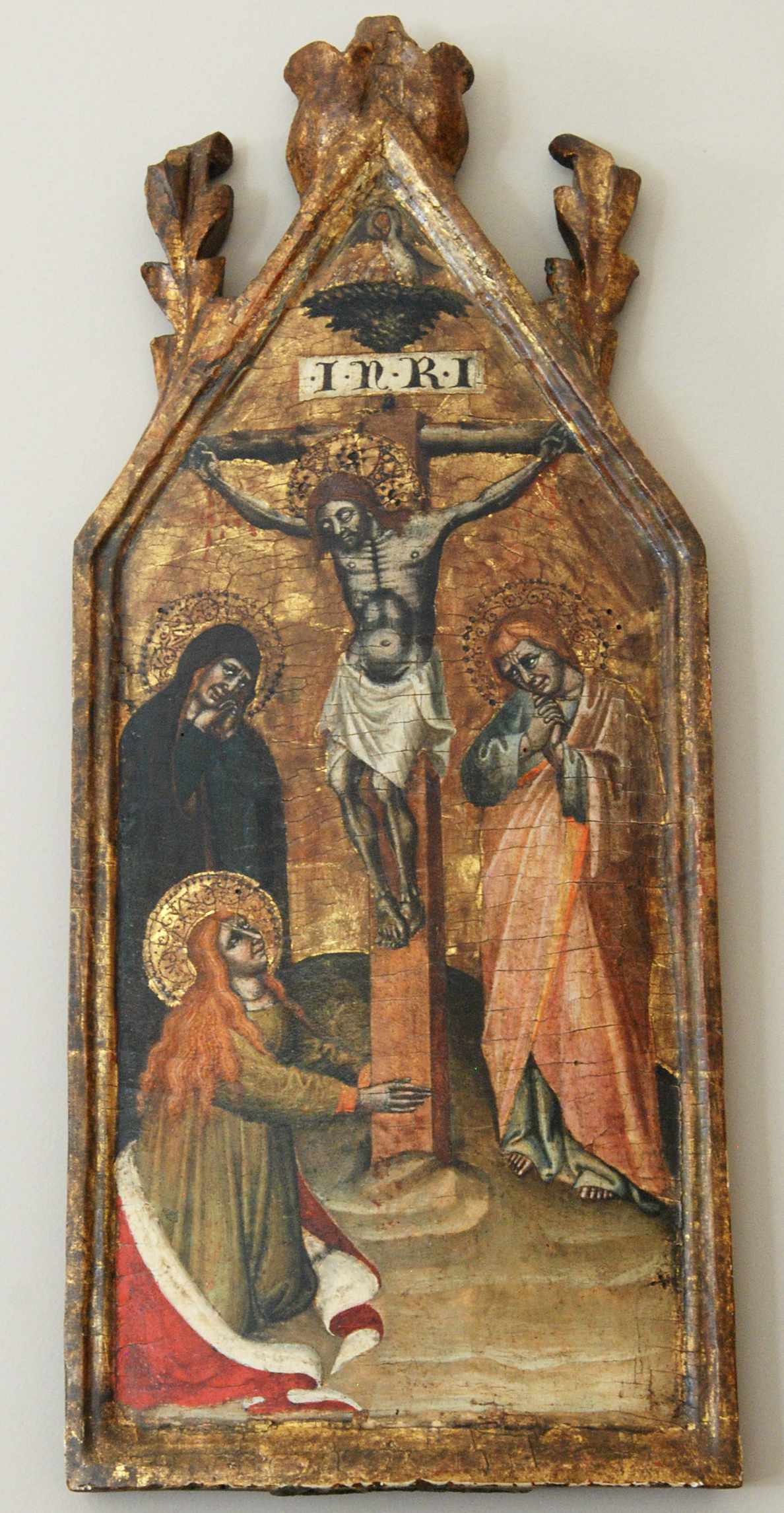 Crucifixion